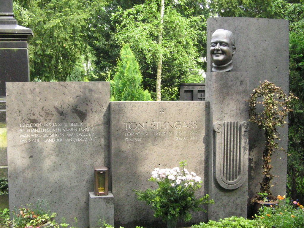 Grabstein von Toni Steingass (Komponist und Verleger) auf dem Melaten-Friedhof in Köln. Bildhauer war Herbert Labusga.